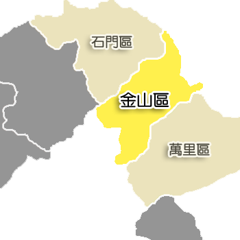 金山區相對位置。